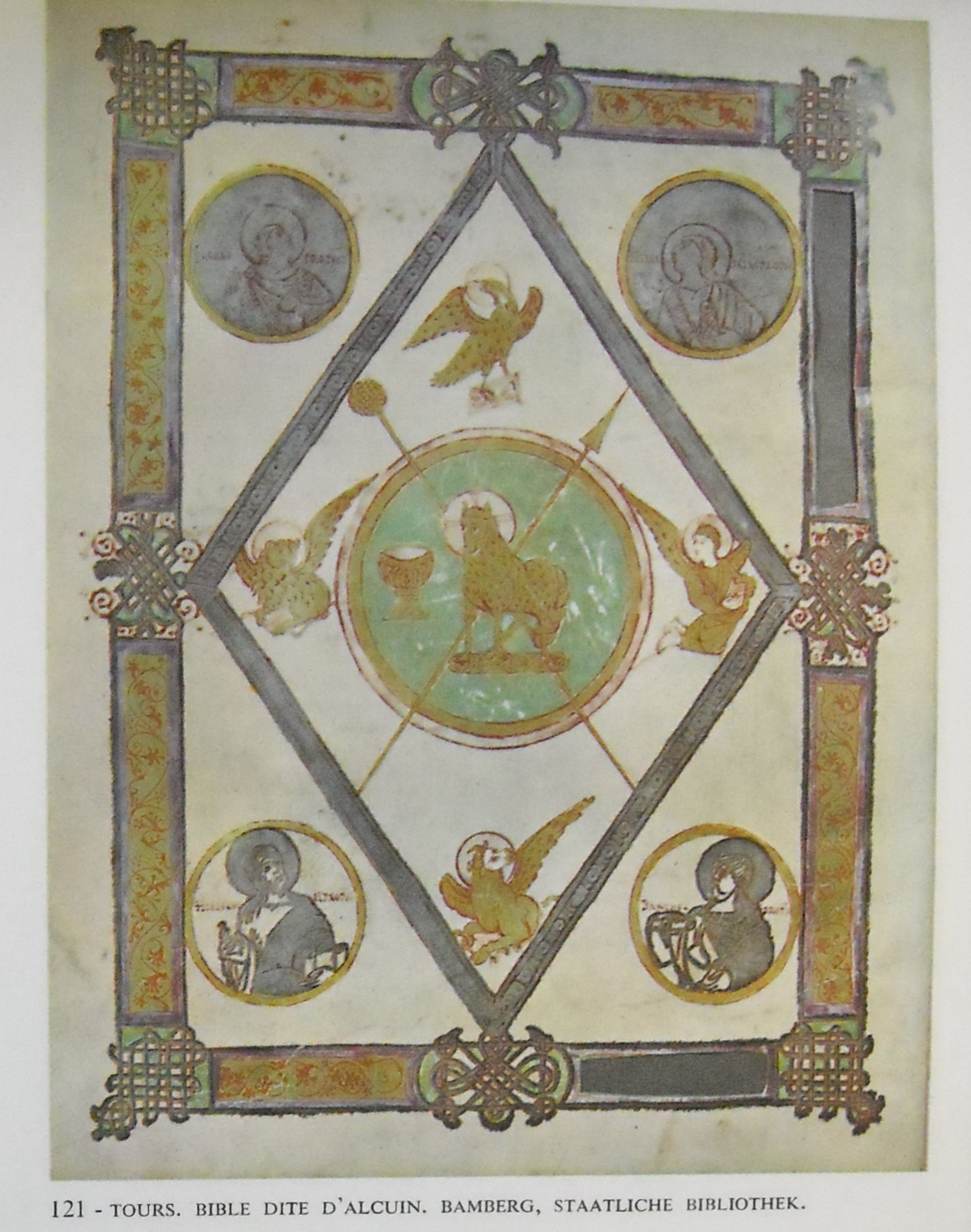 Агнец Божий - символ Христа. Иллюстрация к Генезису Евангелия из Бамберга (Евангелия Алкуина), кон.VIII - нач. IX века.